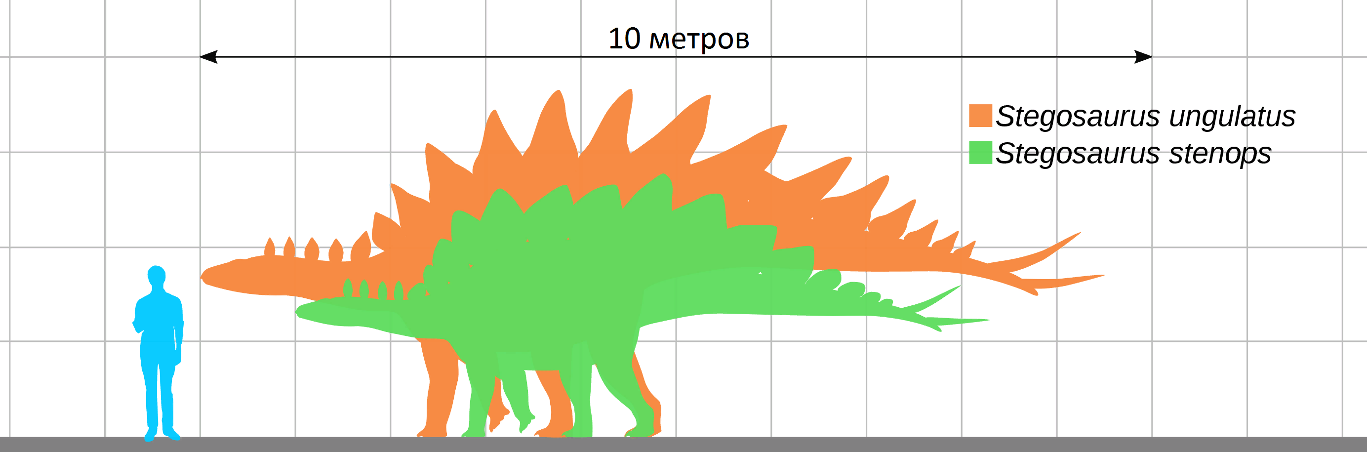 Сравнение размеров человека и двух видов стегозавра (Stegosaurus). Размер основан на: S. ungulatus (YPM 1853) - Holtz, Thomas R. Jr. (2012) Dinosaurs: The Most Complete, Up-to-Date Encyclopedia for Dinosaur Lovers of All Ages, Winter 2011 Appendix. S. stenops (USNM 4934) - Galton, Peter. (2010). Species of plated dinosaur Stegosaurus (Morrison Formation, Late Jurassic) of western USA: New type species designation needed. Swiss Journal of Geosciences. 103. 187-198. 10.1007/s00015-010-0022-4. Благодарности: Scott A. Hartman - ( GetAwayTrike - (